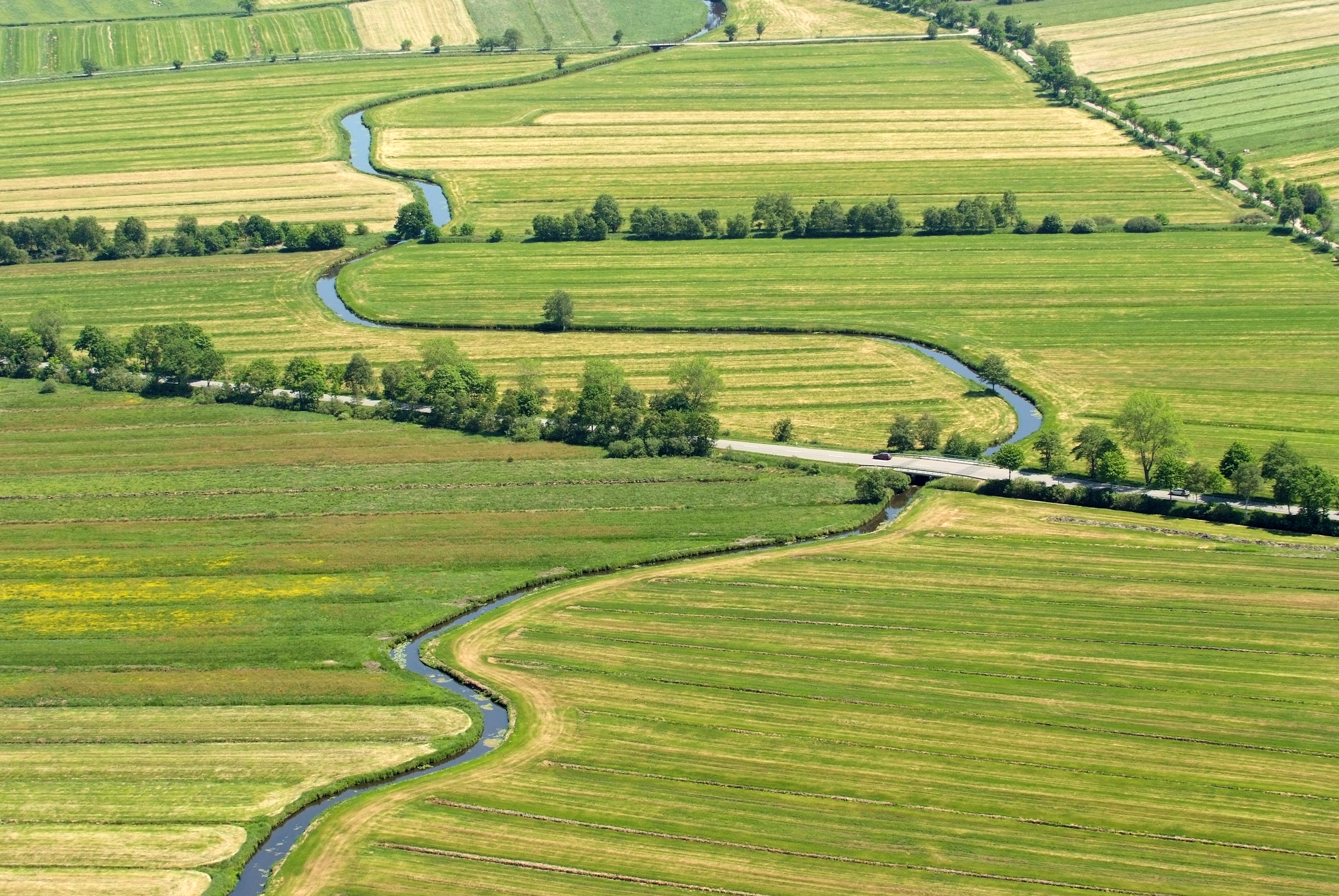 Fotoflug vom Flugplatz Nordholz-Spieka über Cuxhaven und Wilhelmshaven